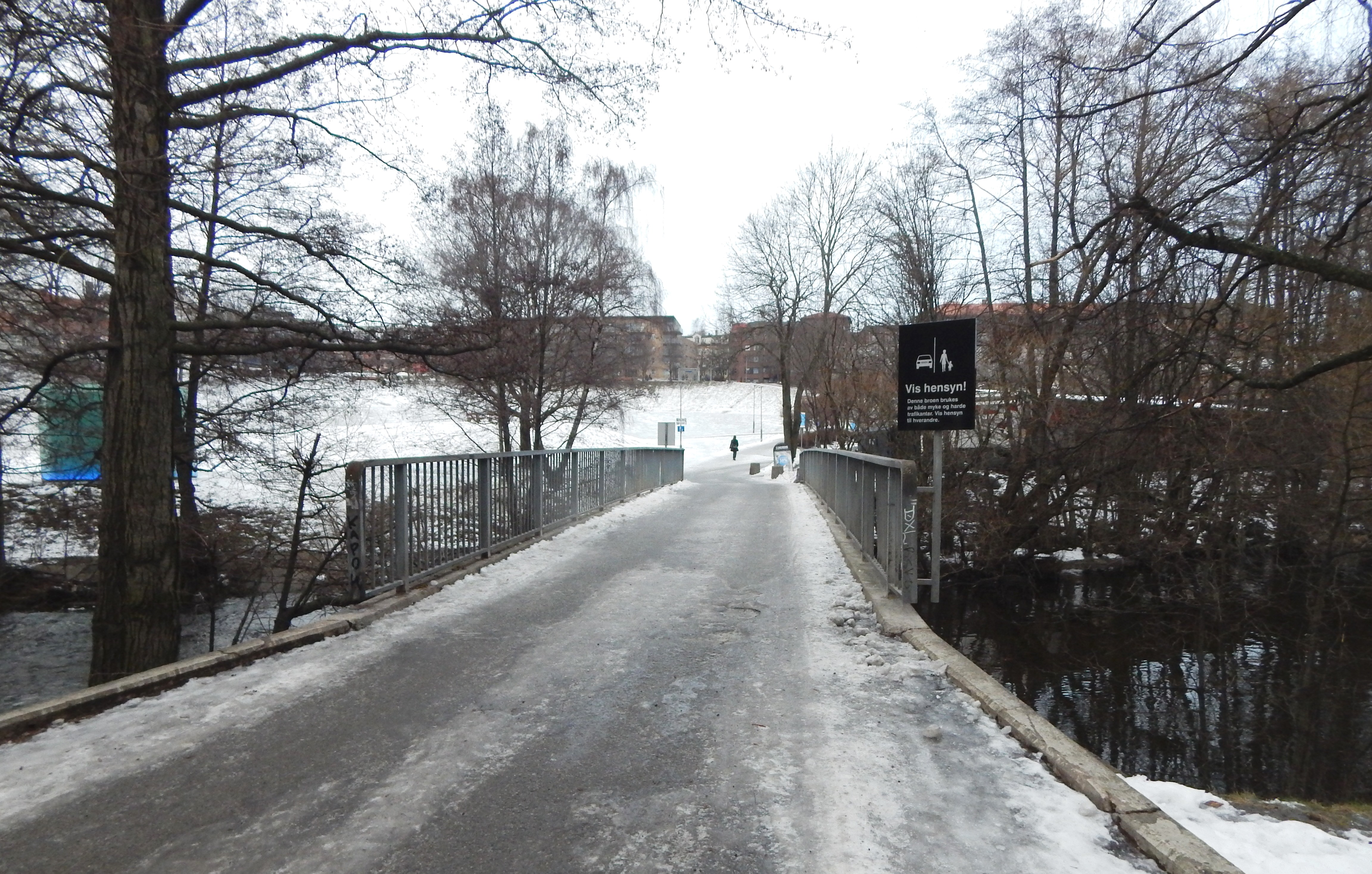 Bro over Akerselva ved Myraløkka